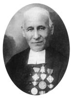 Piemontèis: Pierre-Louis Vescoz